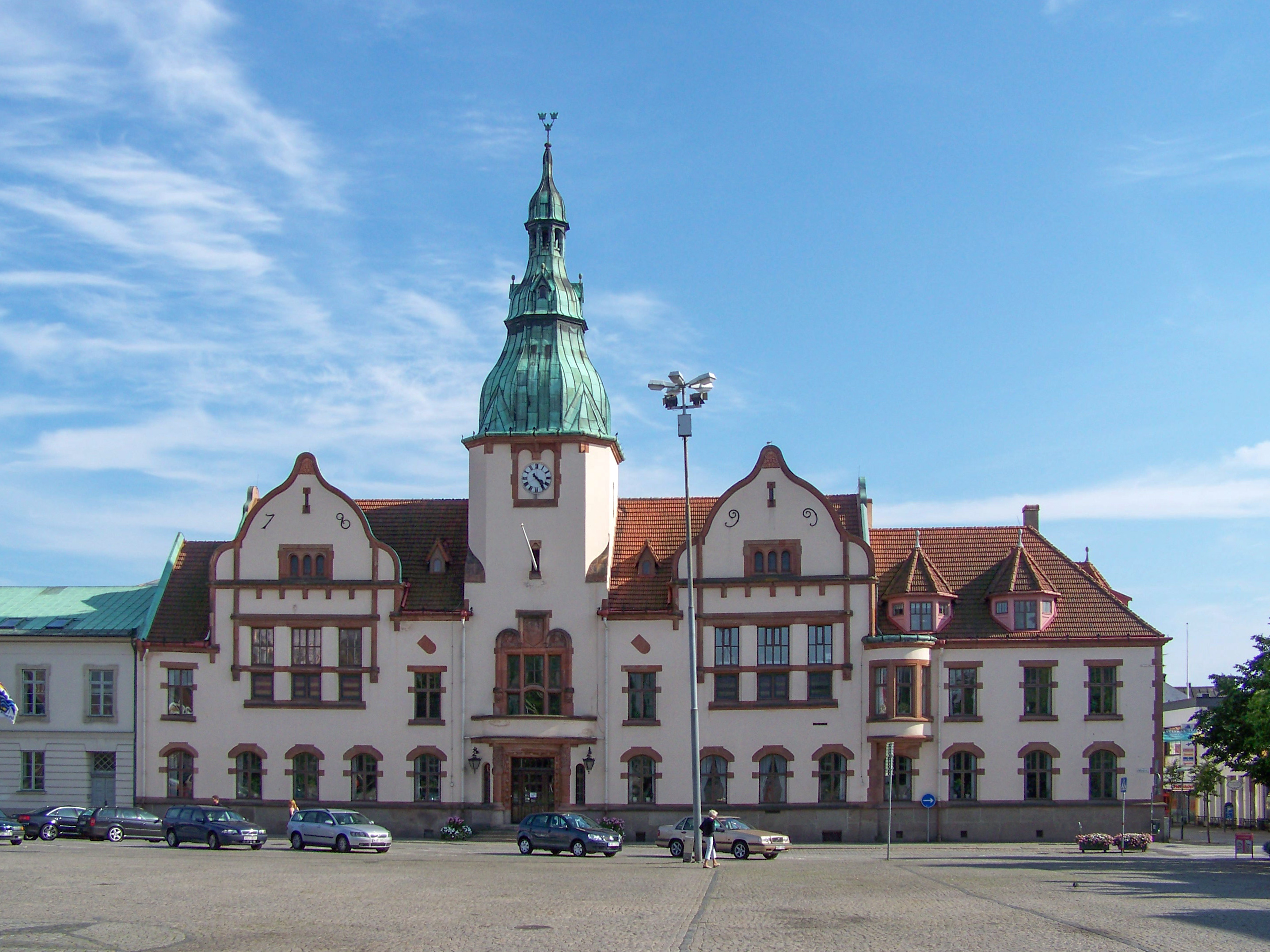 In Schweden. Karlshamn